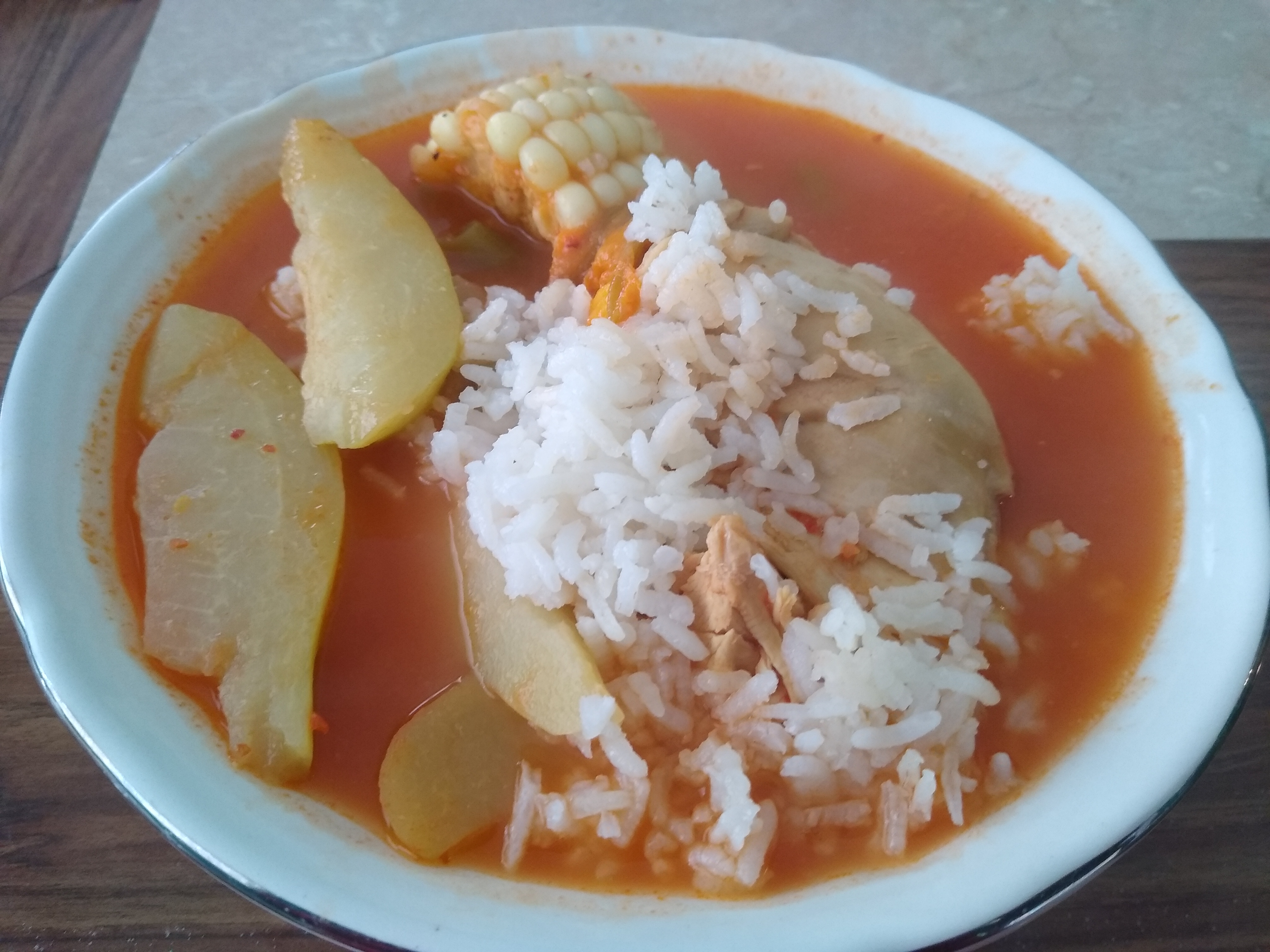 Tesmole de pollo con arroz típico de Orizaba